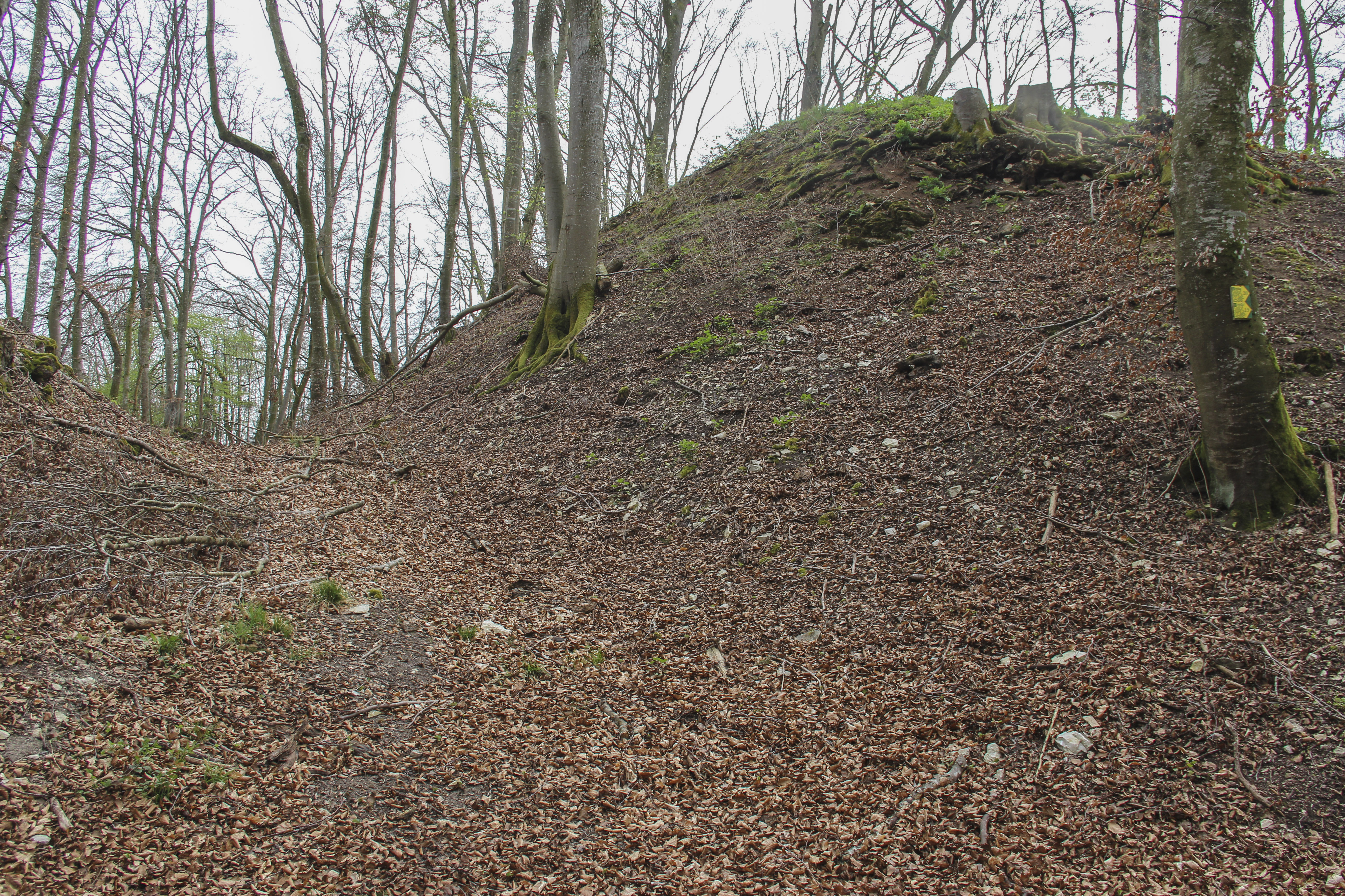 Burg Stahelsberg, Panorama, Graben